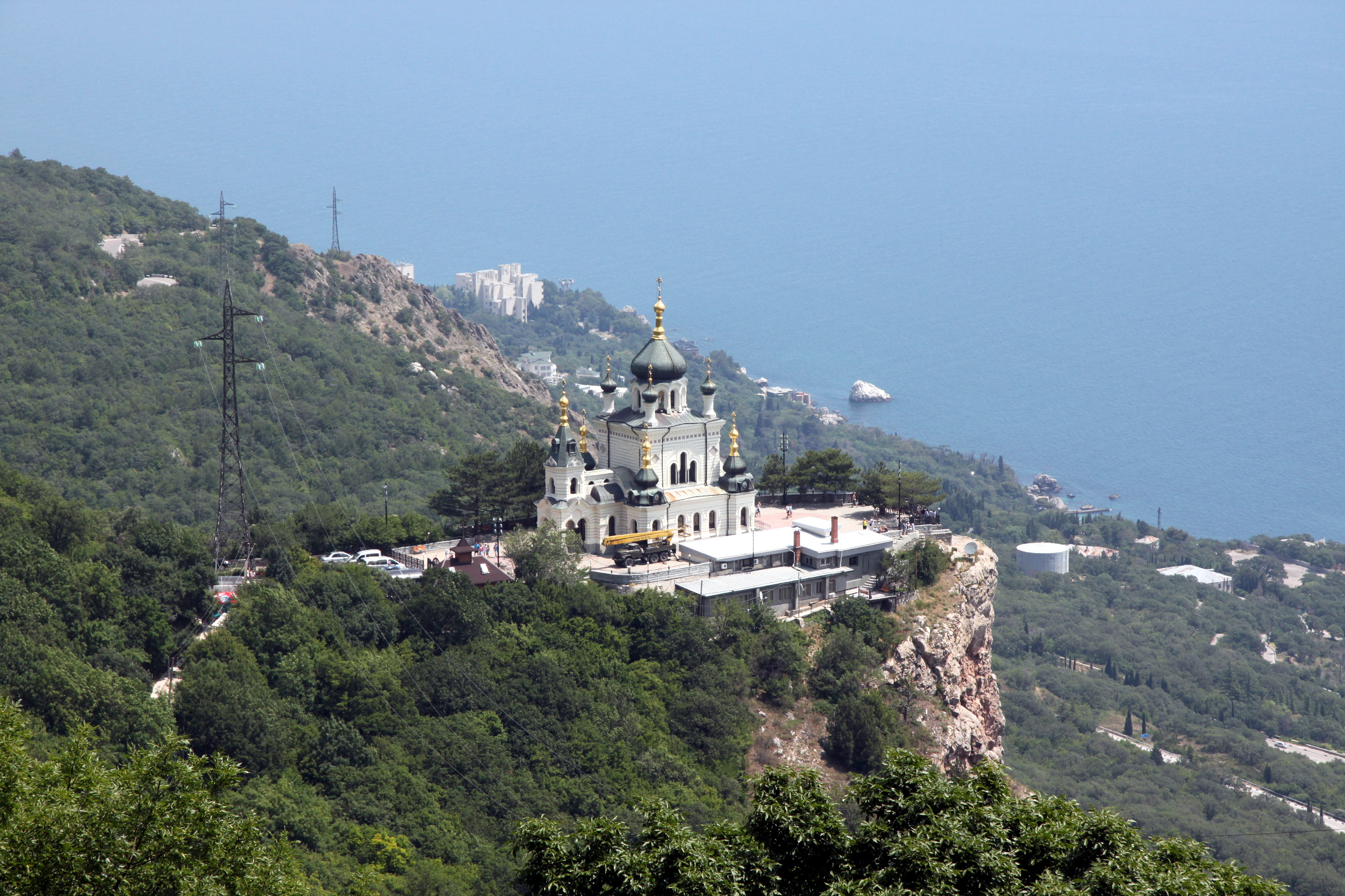 Церква Воскресіння Христового, Форос, с. Форос, поблизу перевалу Байдарські ворота